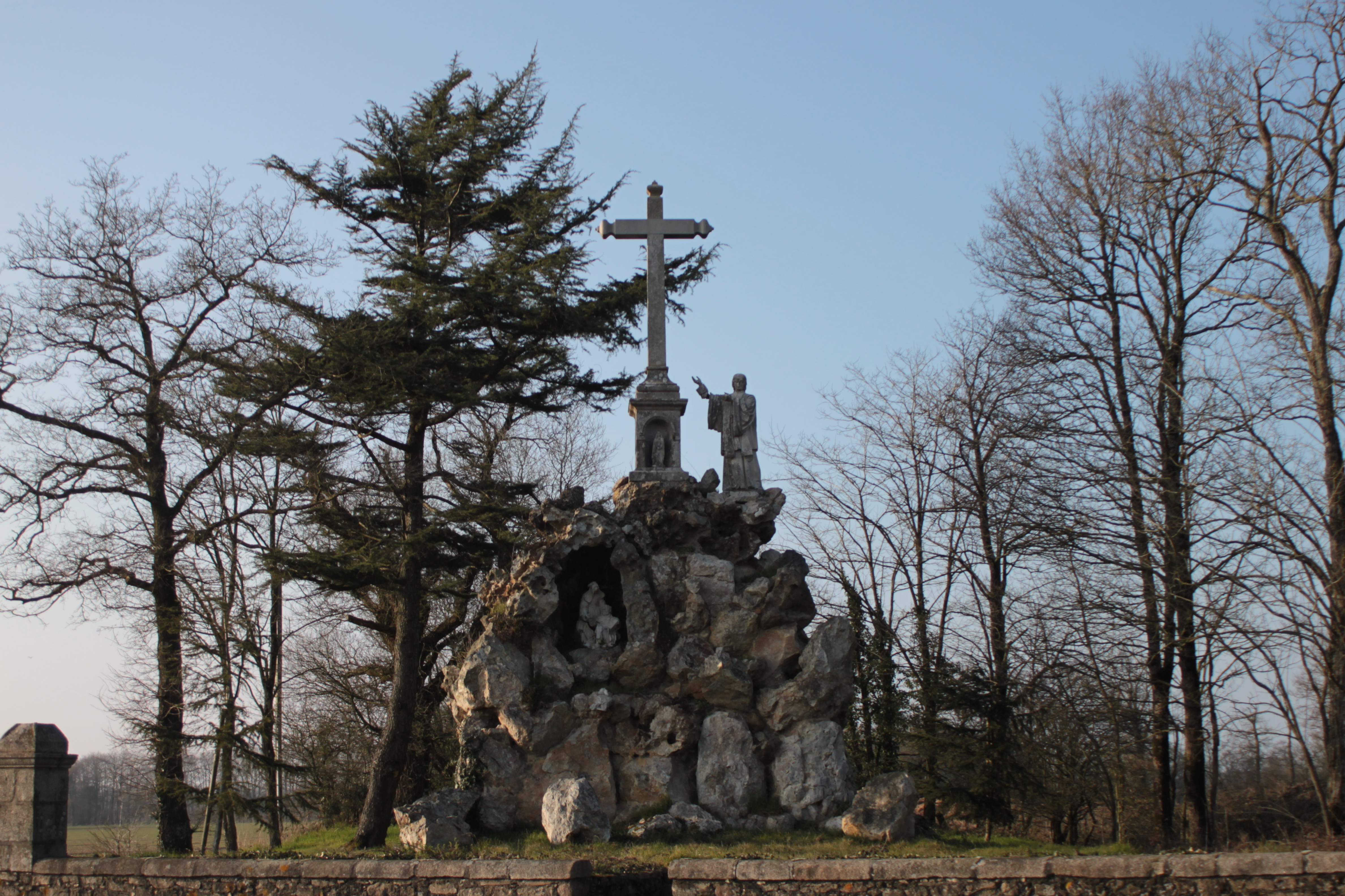 Calvaire de Montfort, le Meslay, Fr-85-La Guyonnière.